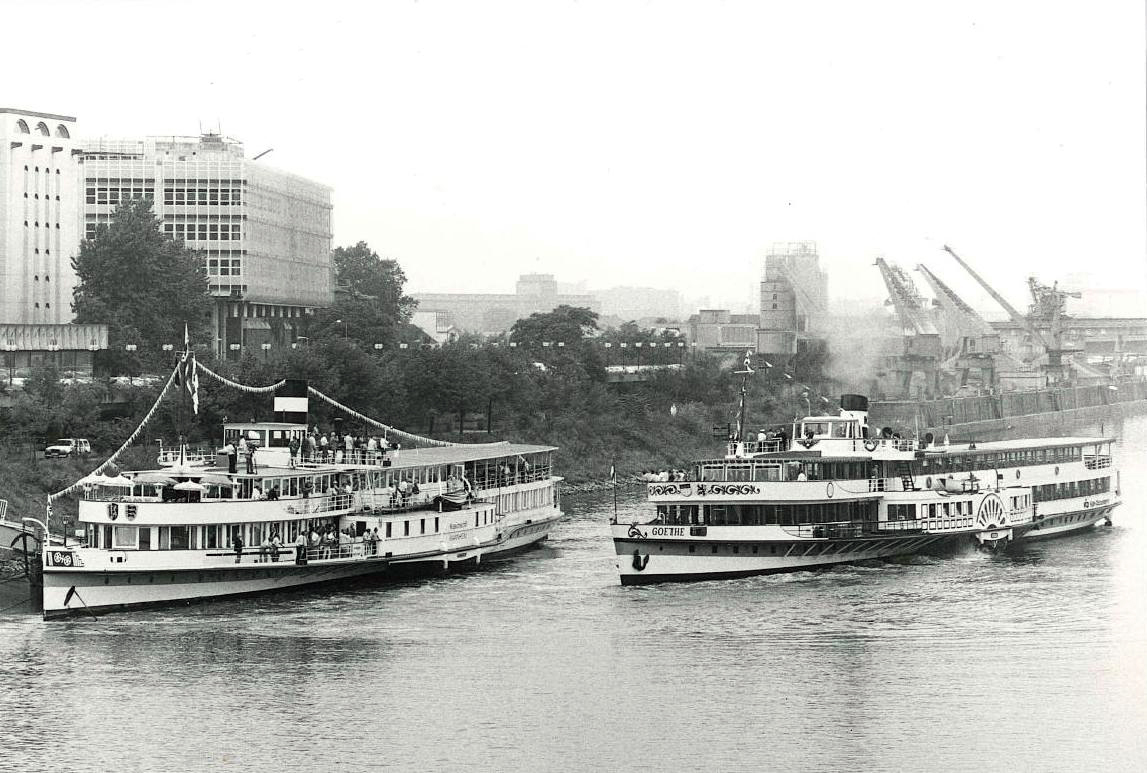 Besuch des Raddampfers Goethe anlässlich des 60. Geburtstags des Museumsschiffs Mannheim am 8. August 1989)